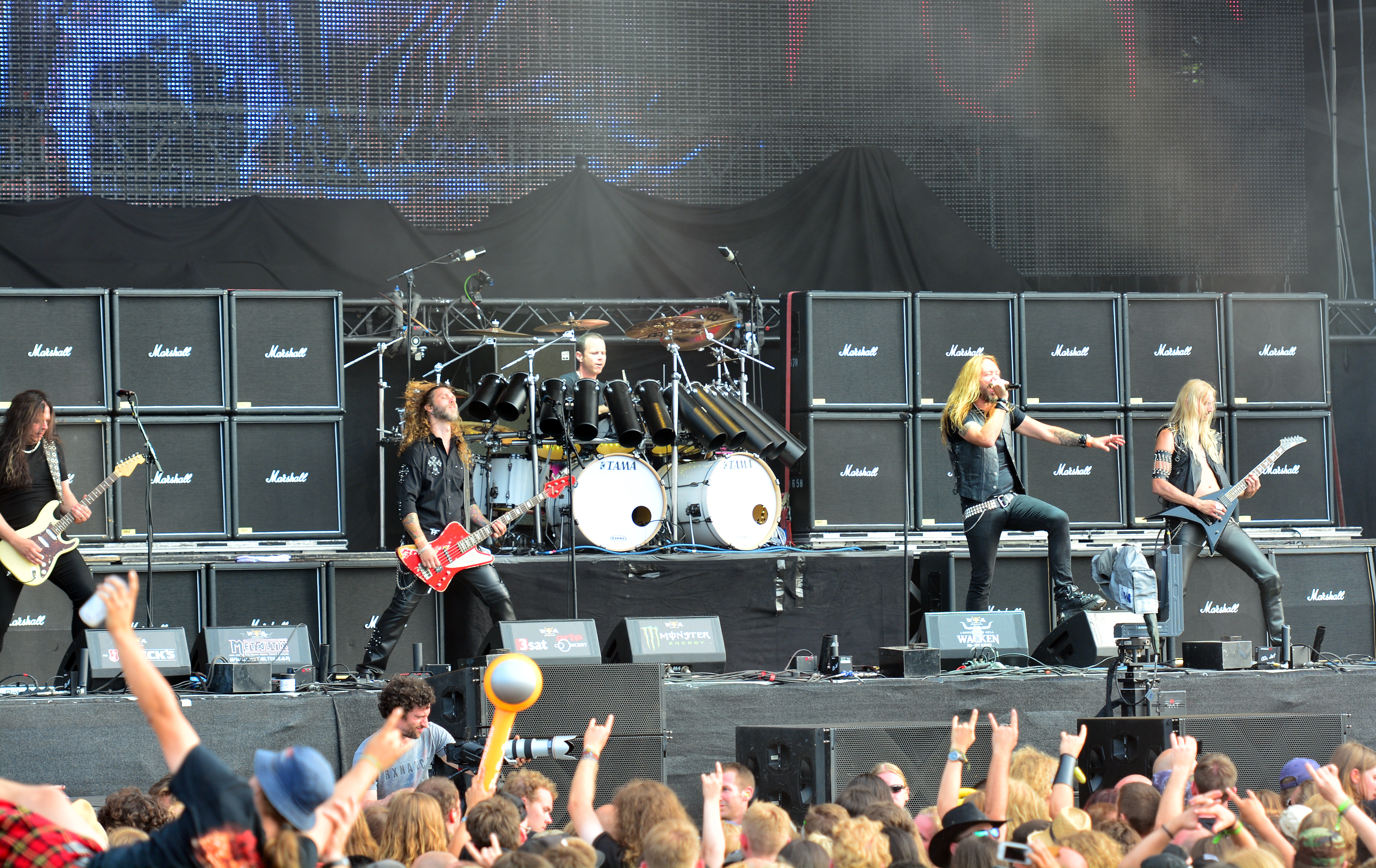 Hammerfall beim Wacken Open Air 2014